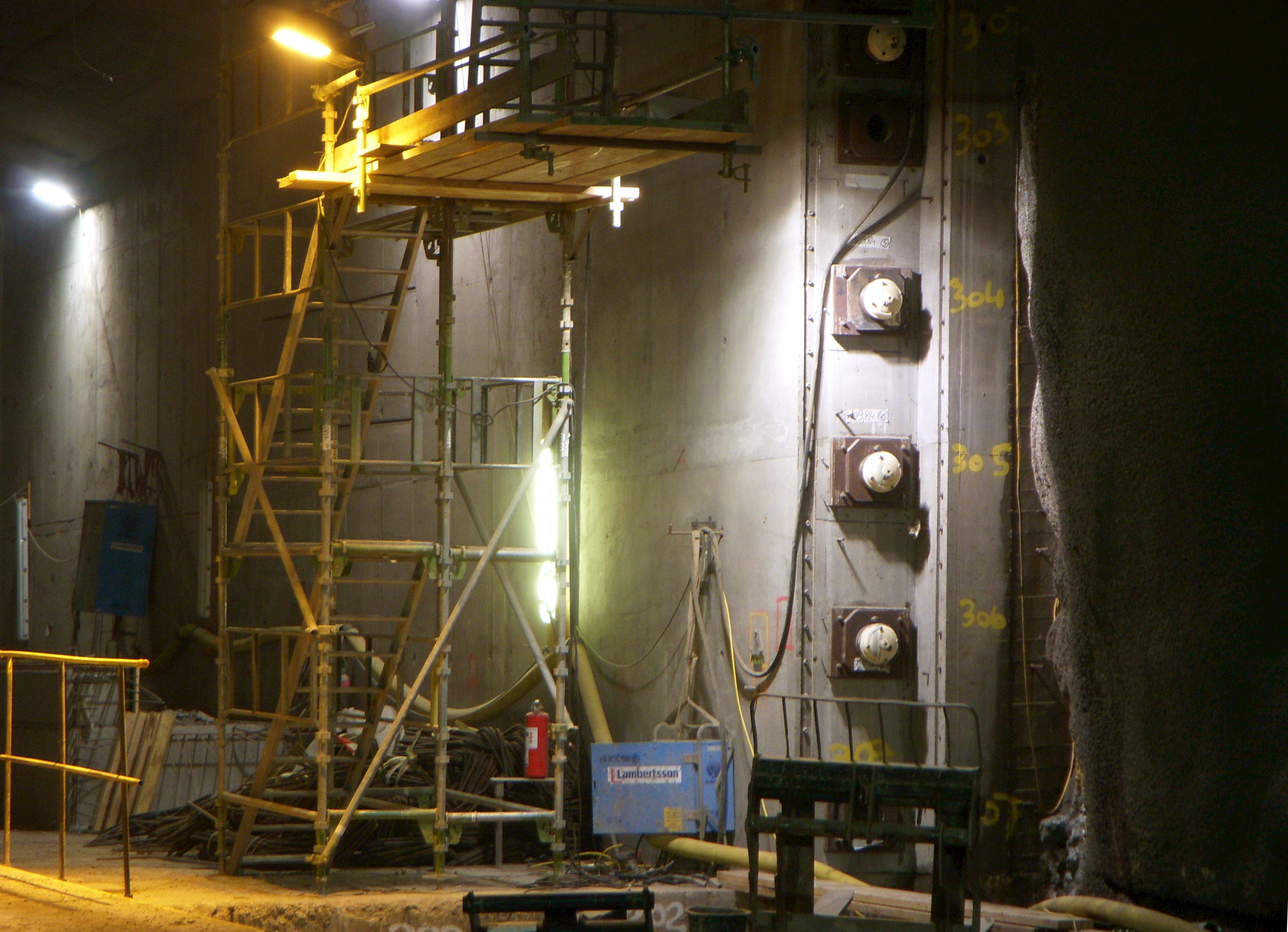 Söderströmstunneln, början av sänktunneldelen